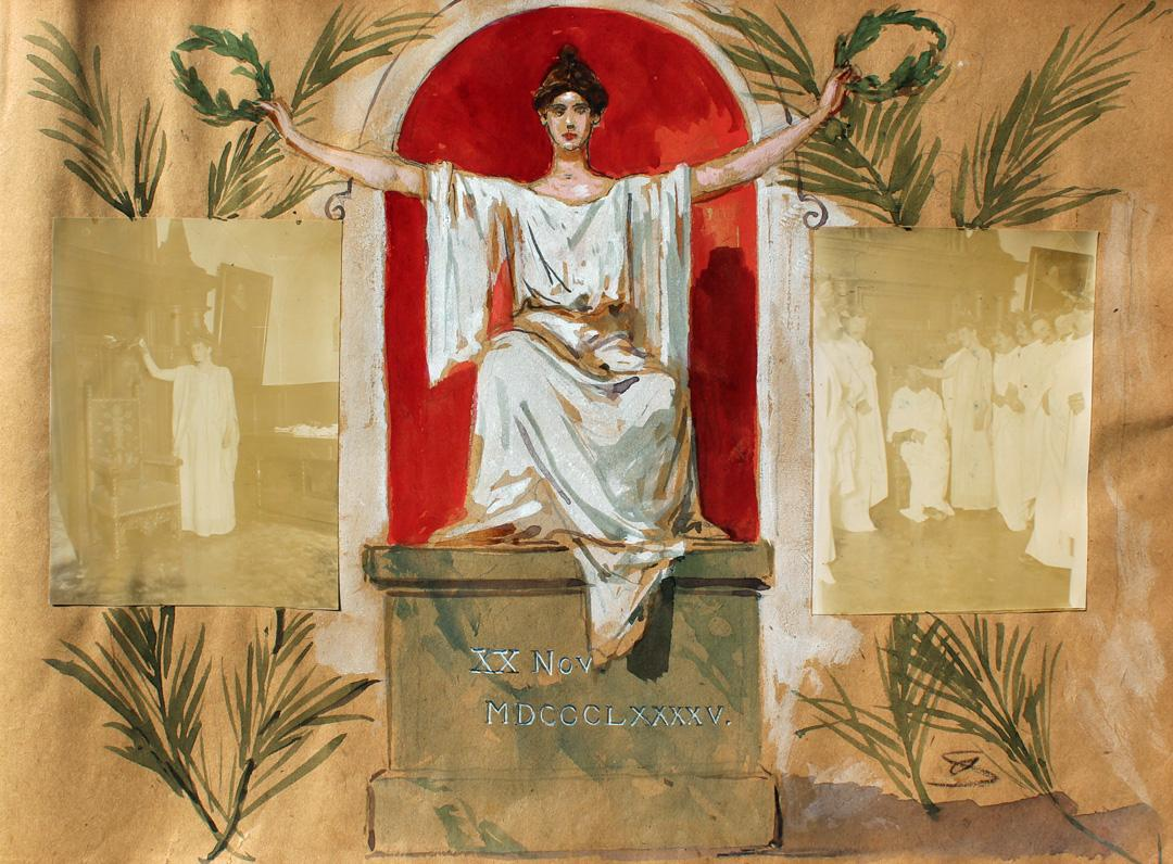 Marie von Miller als Pallas Athene, Aquarell von Gustav Seitz auf braunem Papier ca. 33 × 25 cm. In der Darstellung monogrammiert. 20. November 1895. Nebst zwei Fotographien der Mitglieder der Mittwochsgesellschaft und Marie von Miller.